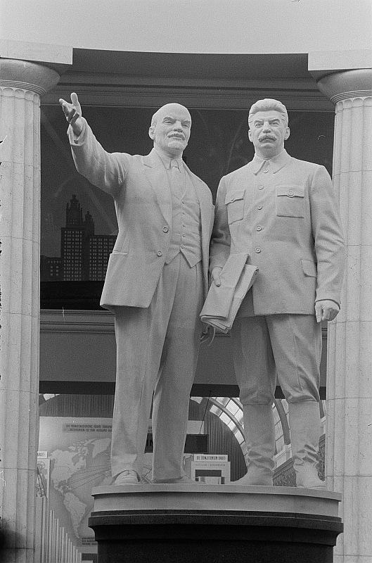 Original image description from the Deutsche FotothekPlastik Lenins und Stalins auf der Leipziger Herbstmesse 1954